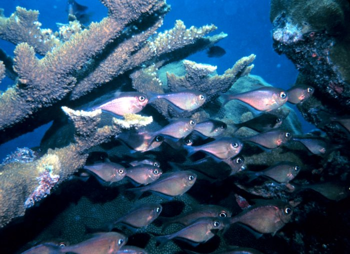 A school of Glassy Sweepers (Pempheris schomburgkii) amongst elkhorn coral. Touched up image from the NOAA Photo Library: Image ID: reef2593, The Coral Kingdom Collection Photographer: Joshua Finegold Credit: Florida Keys National Marine Sanctuary